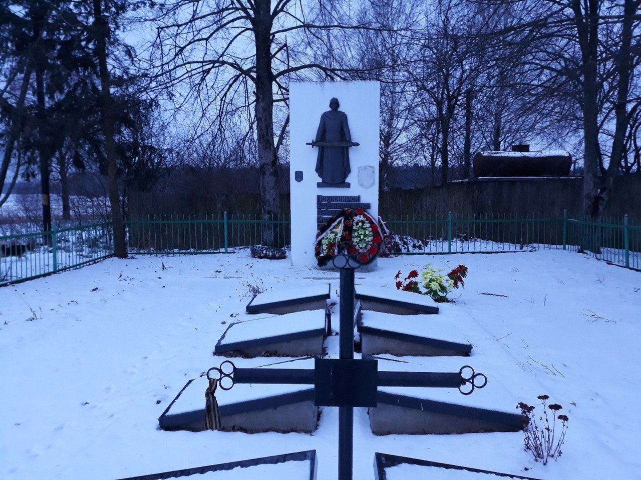 Братэцкая магіла ў в. Расава